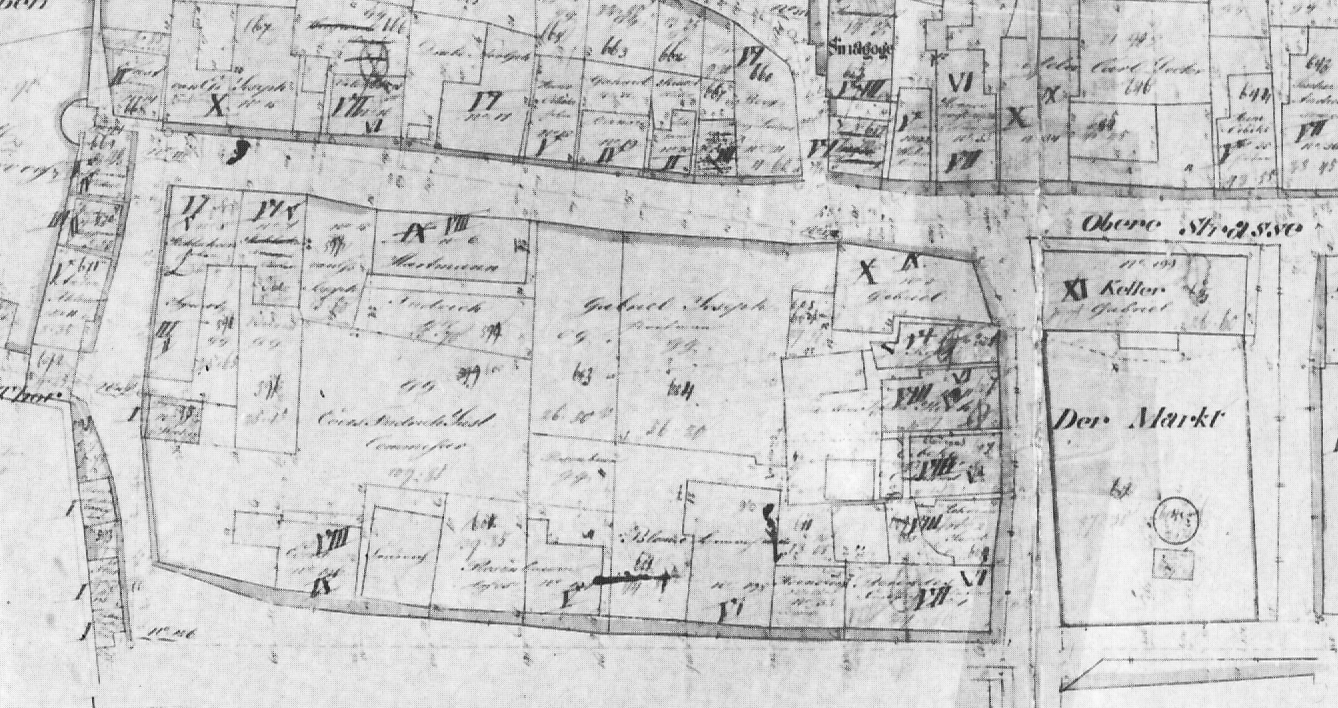 Warburg Klockenstraße, Katasterplan 1831